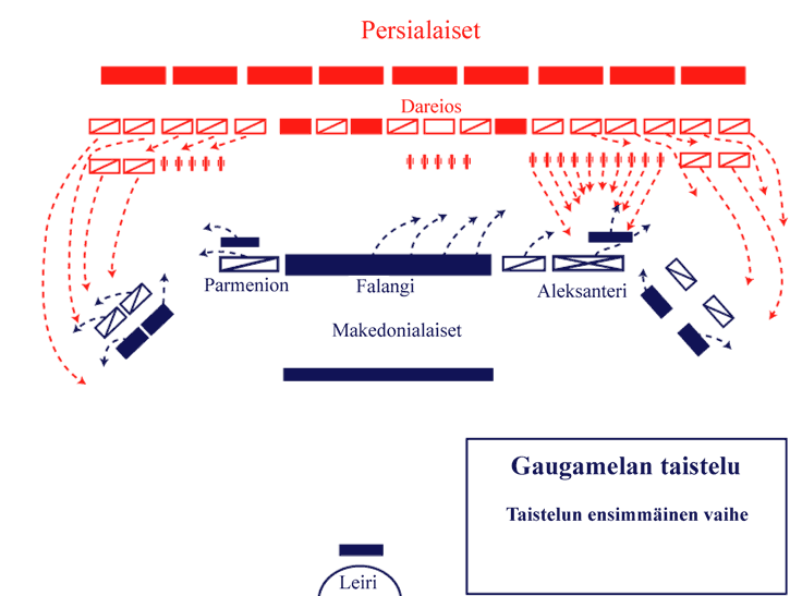 Battle of Gaugamela, Gaugamelan taistelu